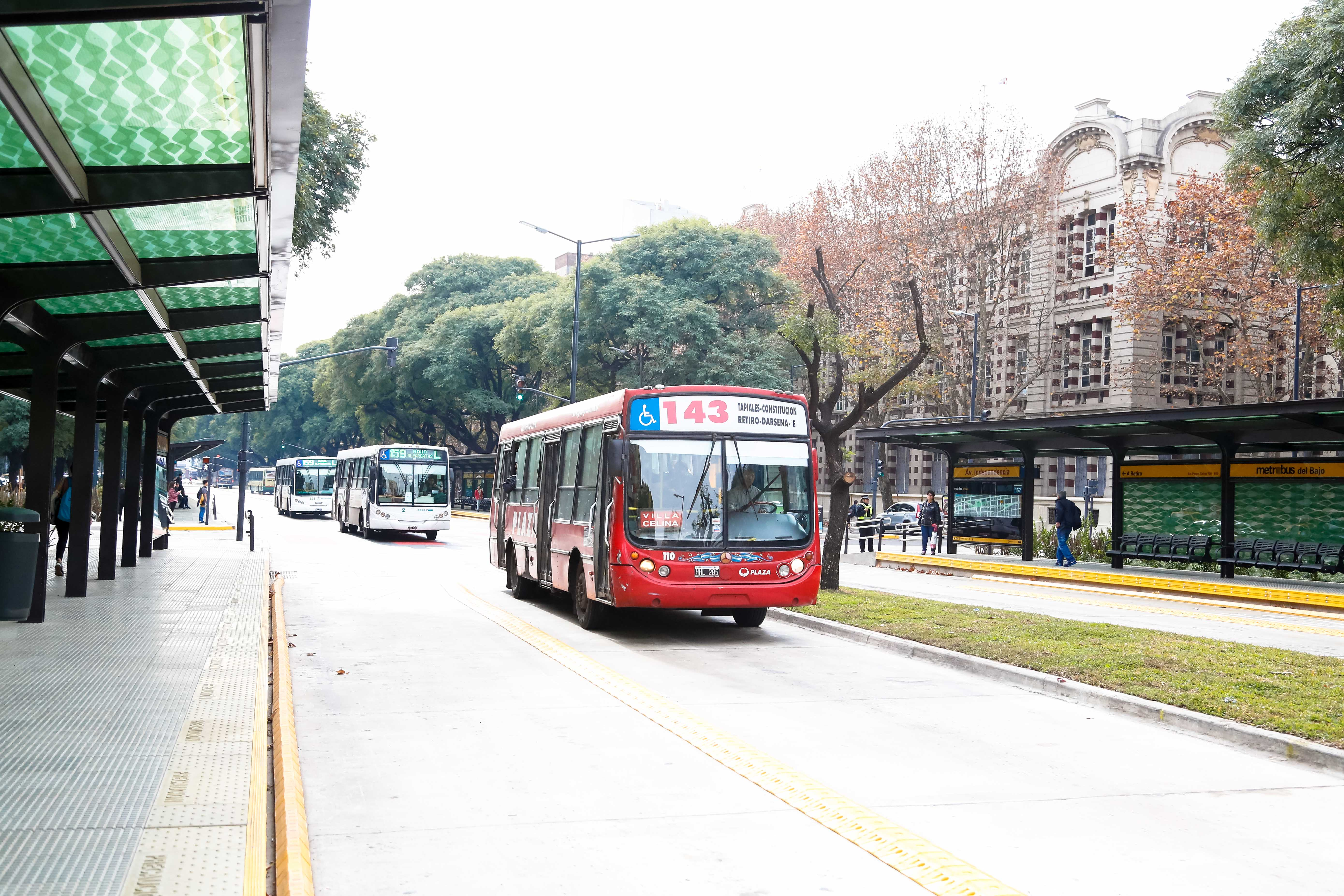 Metrobus del Bajo (avenidas Paseo Colón y Leandro Alem).